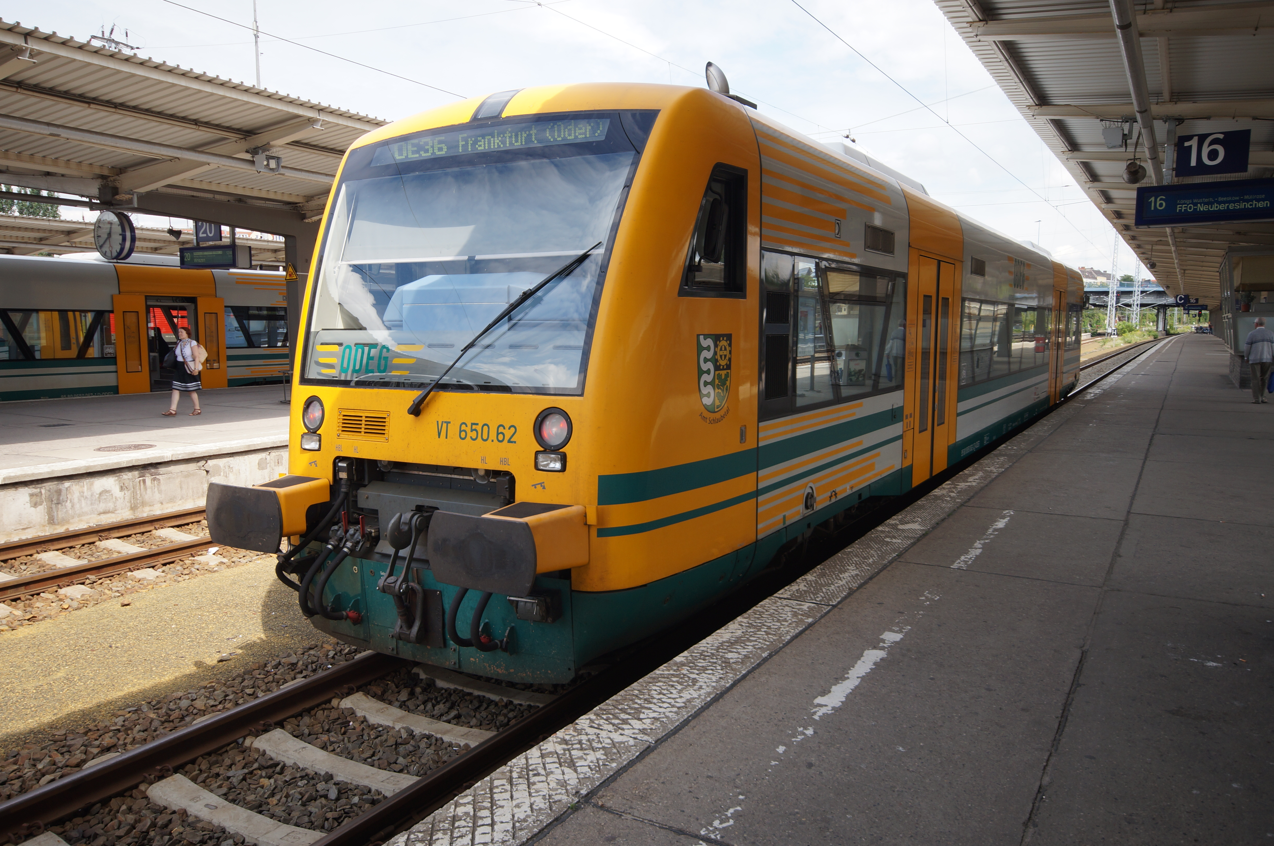 Stadler Regio-Shuttle RS1 (VT 650.62 Amt Schlaubetal) der Ostdeutschen Eisenbahn im Bahnhof Berlin-Lichtenberg auf dem Weg nach Frankfurt (Oder)